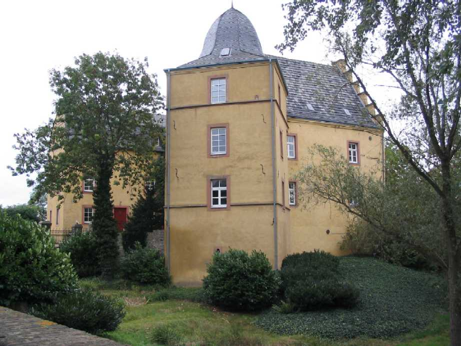 Burg Bodenheim, Westturm/Bodenheim Castle, West Tower